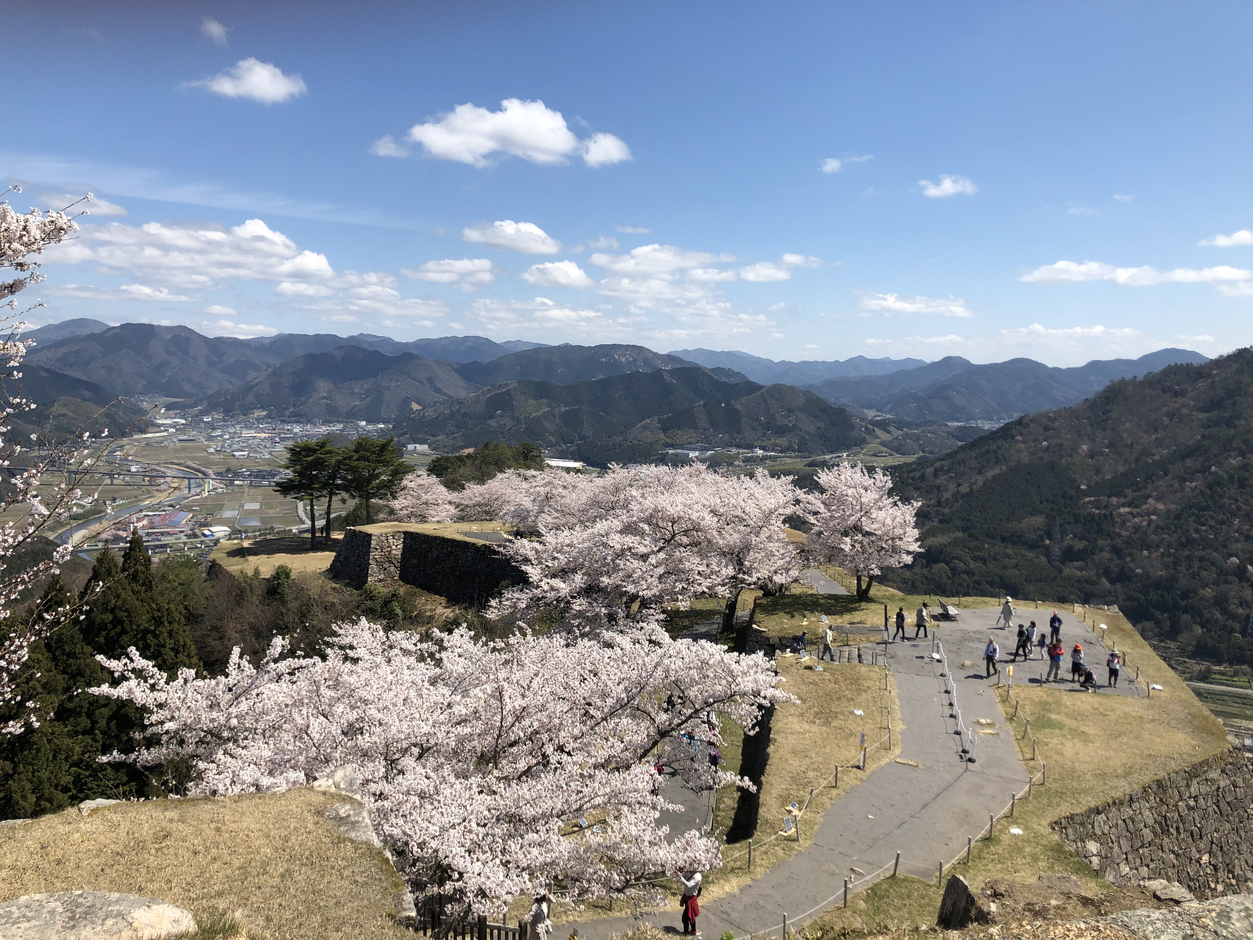 桜満開のja:竹田城